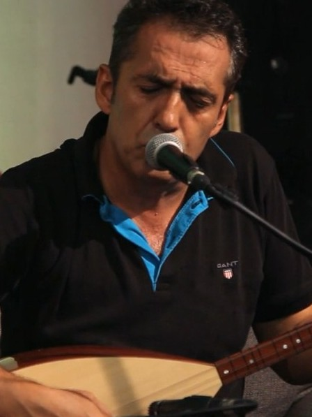 Akustikhane'de Yavuz Bingöl